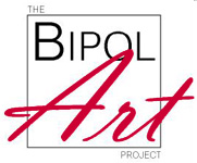 Logo des BipolArt-Projekts. BipolArt ist ein Projekt, das durch eine Internetplattform bipolar (manisch-depressiv) erkrankten Menschen ermöglicht, die Werke ihres kreativen Schaffens kostenlos zu präsentieren, Werke der bildenden Kunst (Gemälde, Grafiken, Zeichnungen, Skulpturen etc.), der Literatur (Lyrik, Prosa) und der Musik.